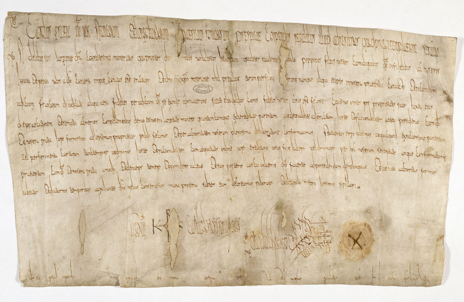 Diplôme de Charlemagne absolvant le comte Theodoldus du crime de lèse-majesté, fait à Aix-la-Chapelle et sans doute revêtu d'un sceau plaqué qui a disparu.